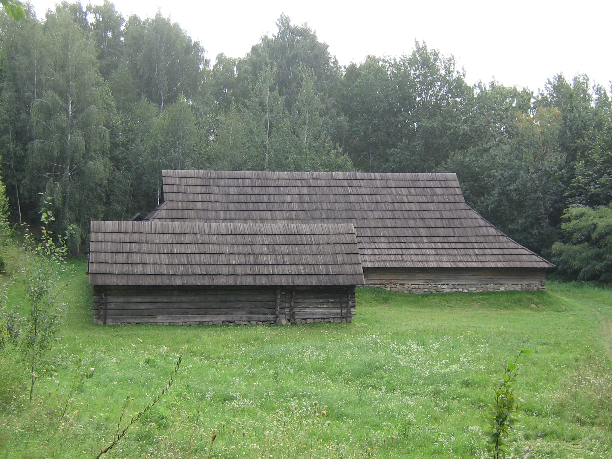 Гражда із смт Верховина.